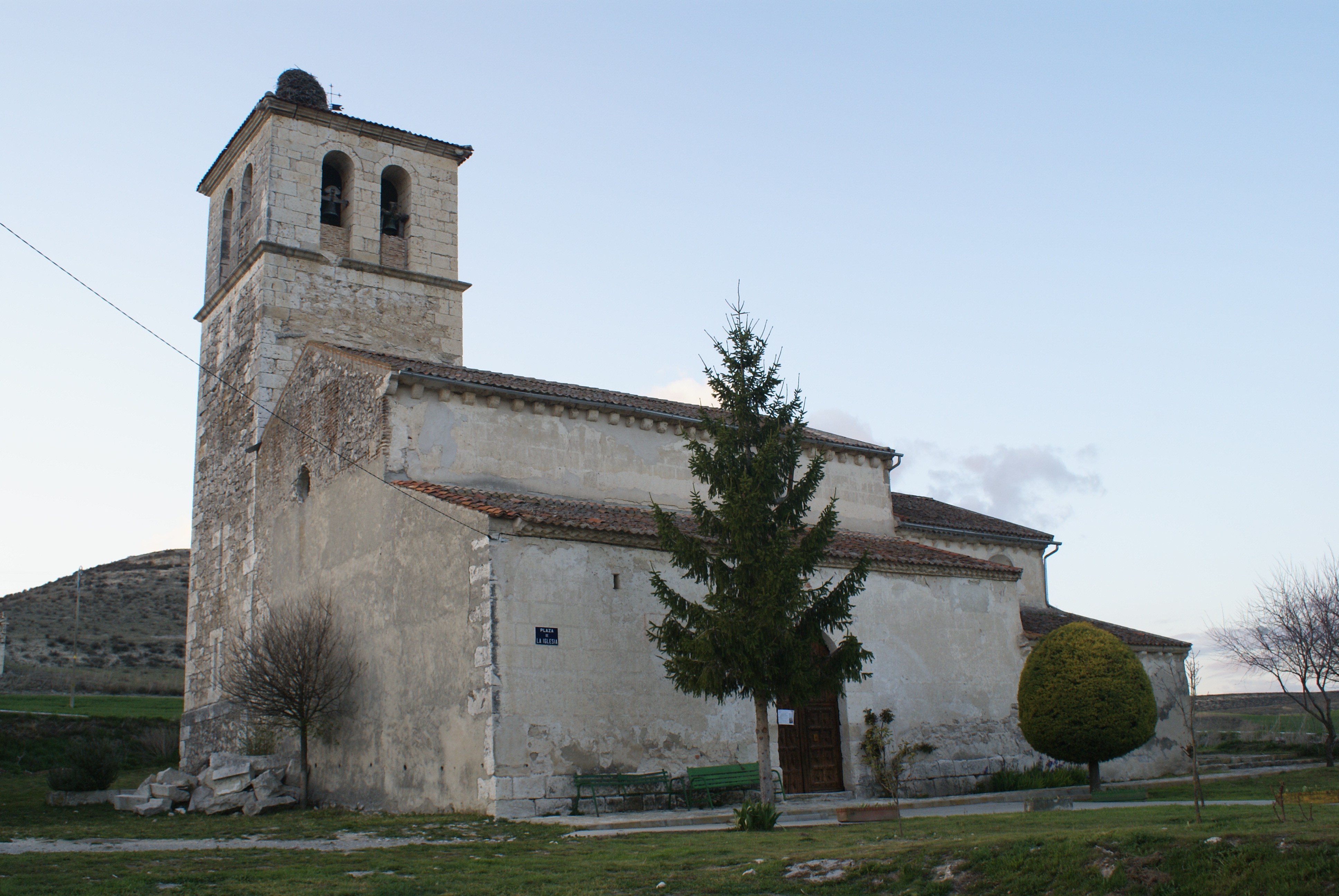 Iglesia de San Pedro Apóstol de Dehesa de Cuéllar, Segovia.